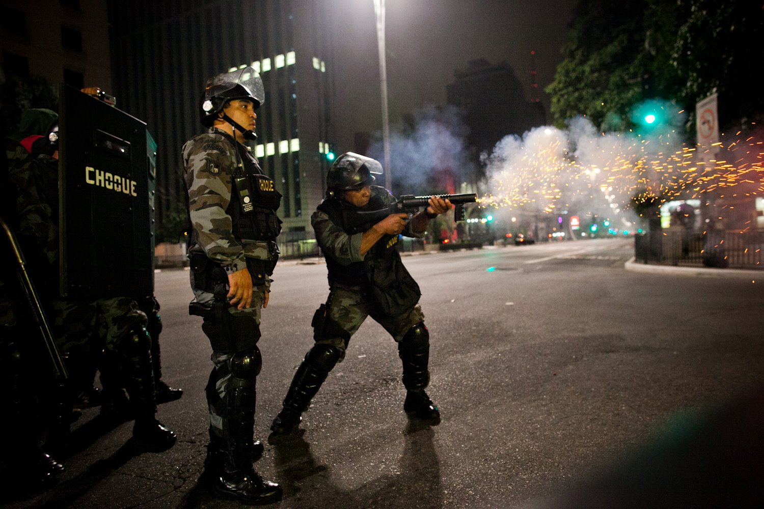 Tropa de Choque atira contra manifestantes.